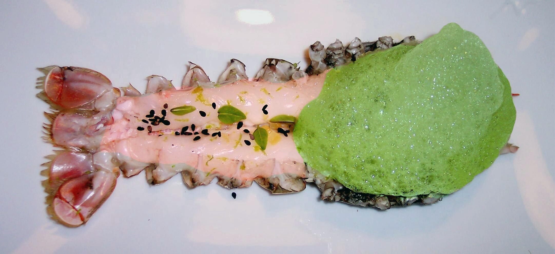 elBulli: Bärenkrebs mit Espuma vom grünen Tee